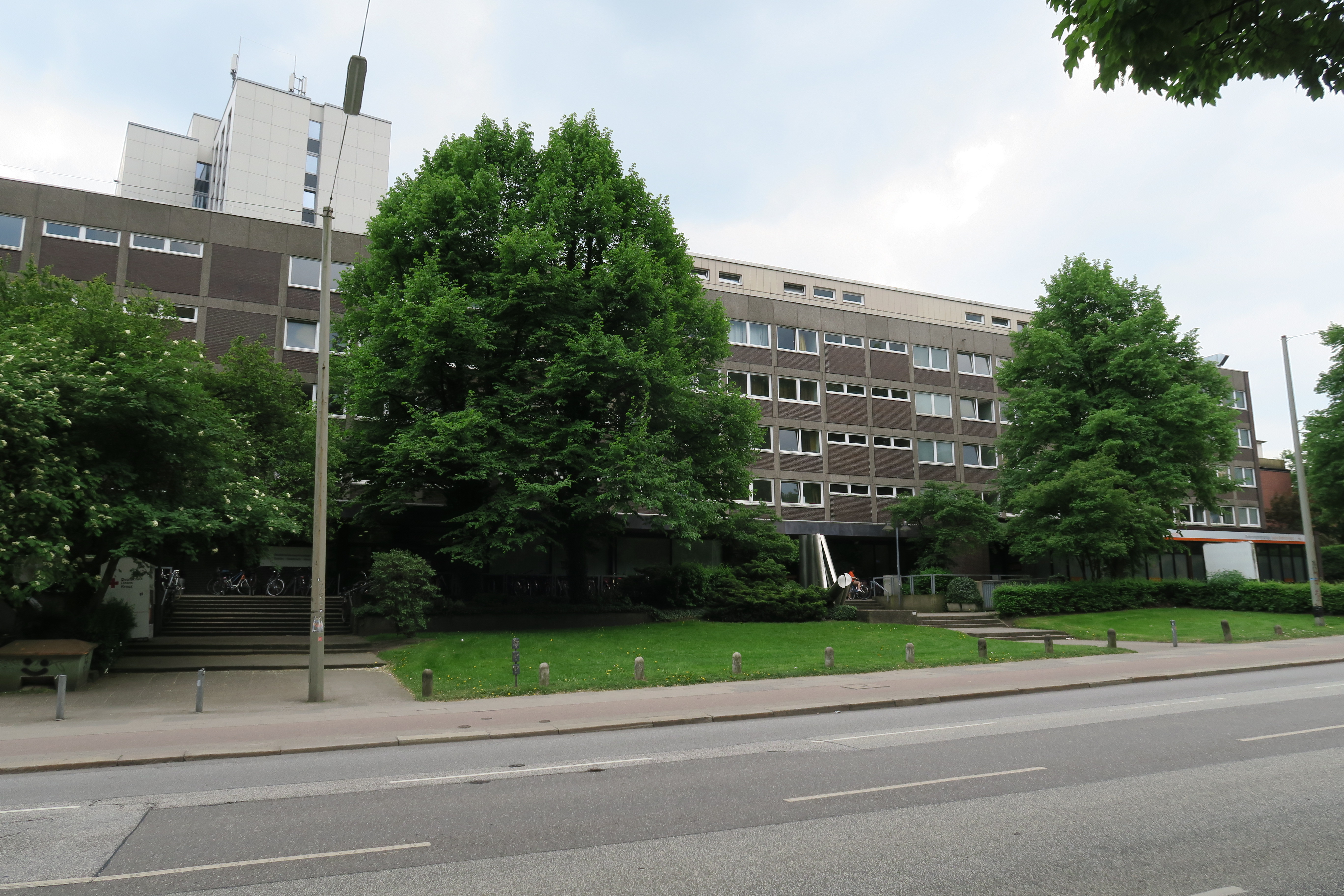 Gustav-Radbruch-Haus in Hamburg-Borgfelde